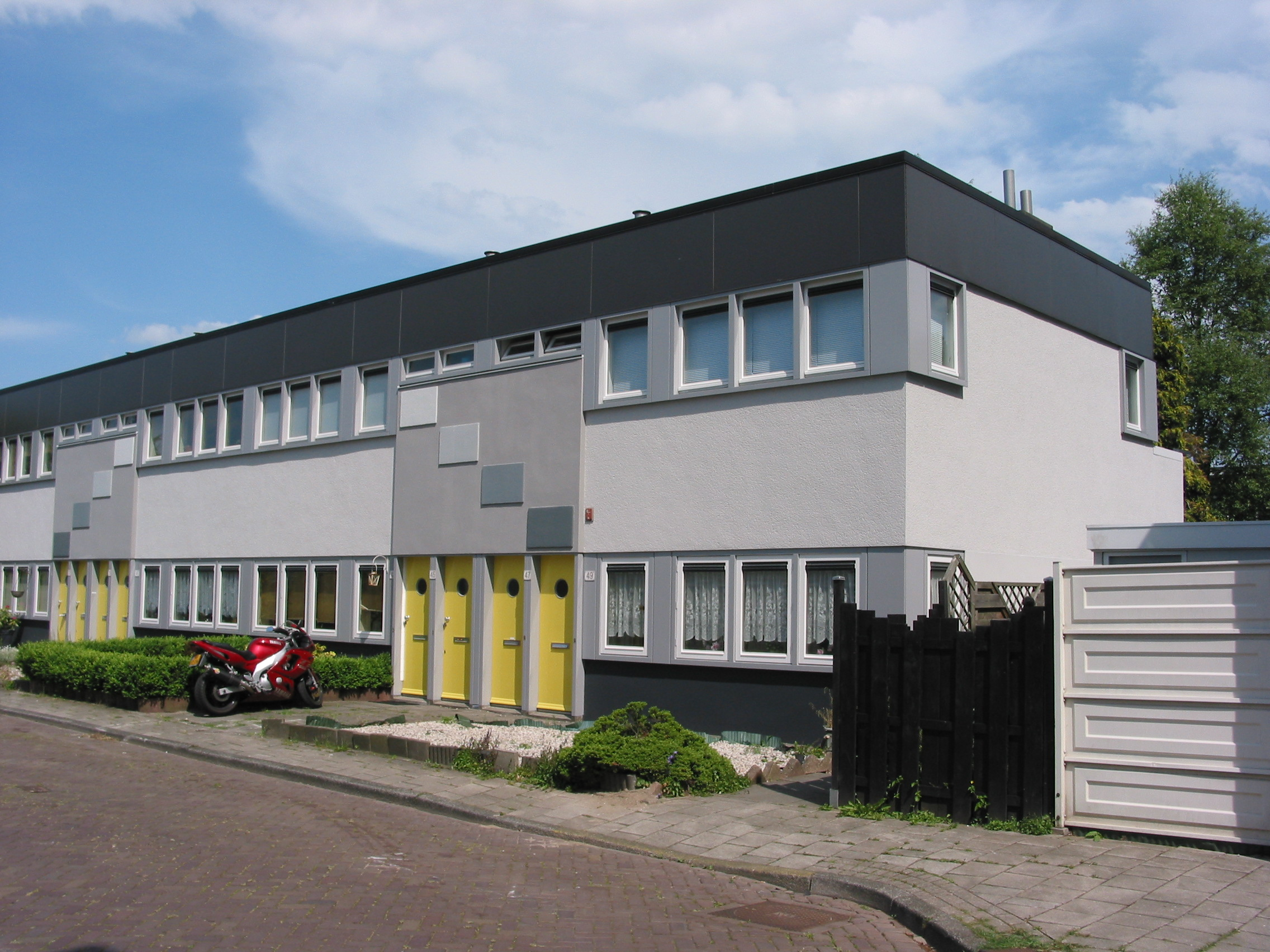 Han van Loghem (architect). Woonhuizen, Schovenstraat, Betondorp, Amsterdam. 1924.